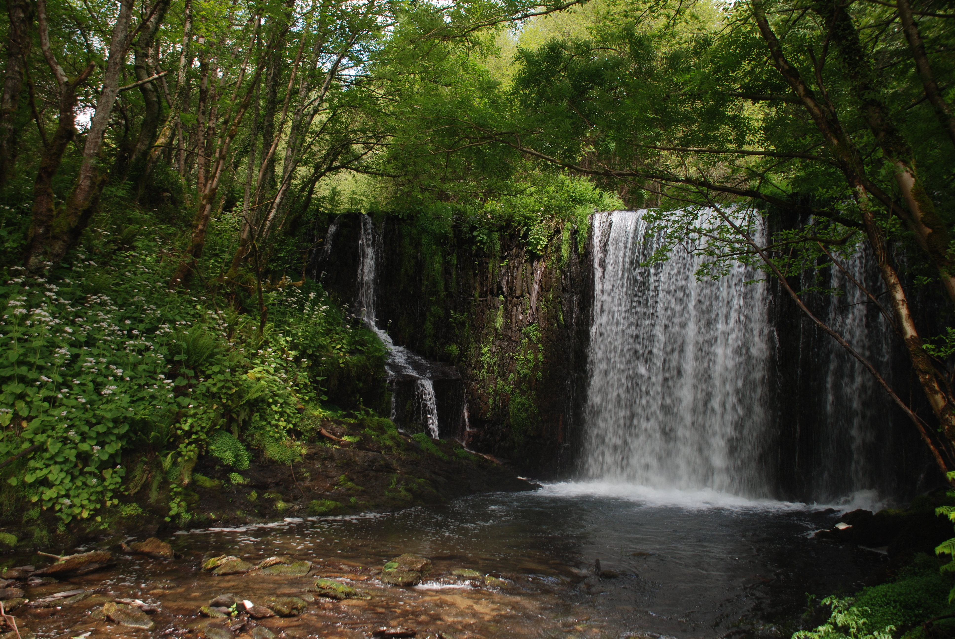 Fervenza da Acea da Serra, no Lugar de Importancia Comunitaria A Marronda, en Baleira. O caneiro aproveita un salto natural duns 3 m de desnivel, e desvía as augas da xunta do río Eo co seu afluente o rego do Castelo para o seu uso na Acea da Serra, o muiño dende o que foi tomada a foto. This is a photography of a Site of Community Importance in Spain with the ID: ES1120004. Natura2000 entry, EEA entry